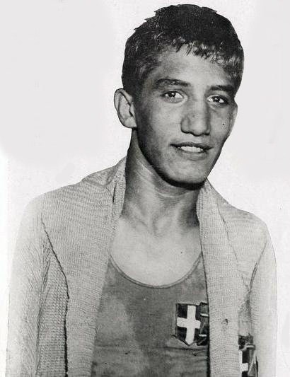 Il pugile italiano Vittorio Tamagnini